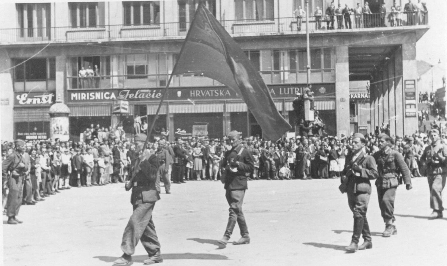 I partigiani della Prima divisione proletaria entrano a Zagabria l'8 maggio 1945